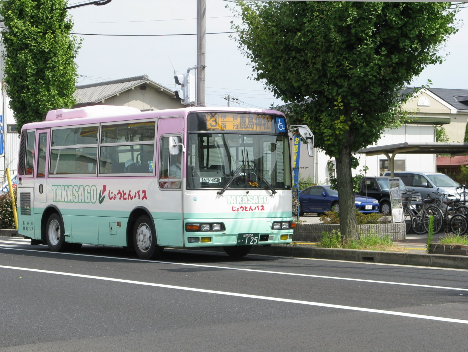 じょうとんバス 高砂市役所付近にて